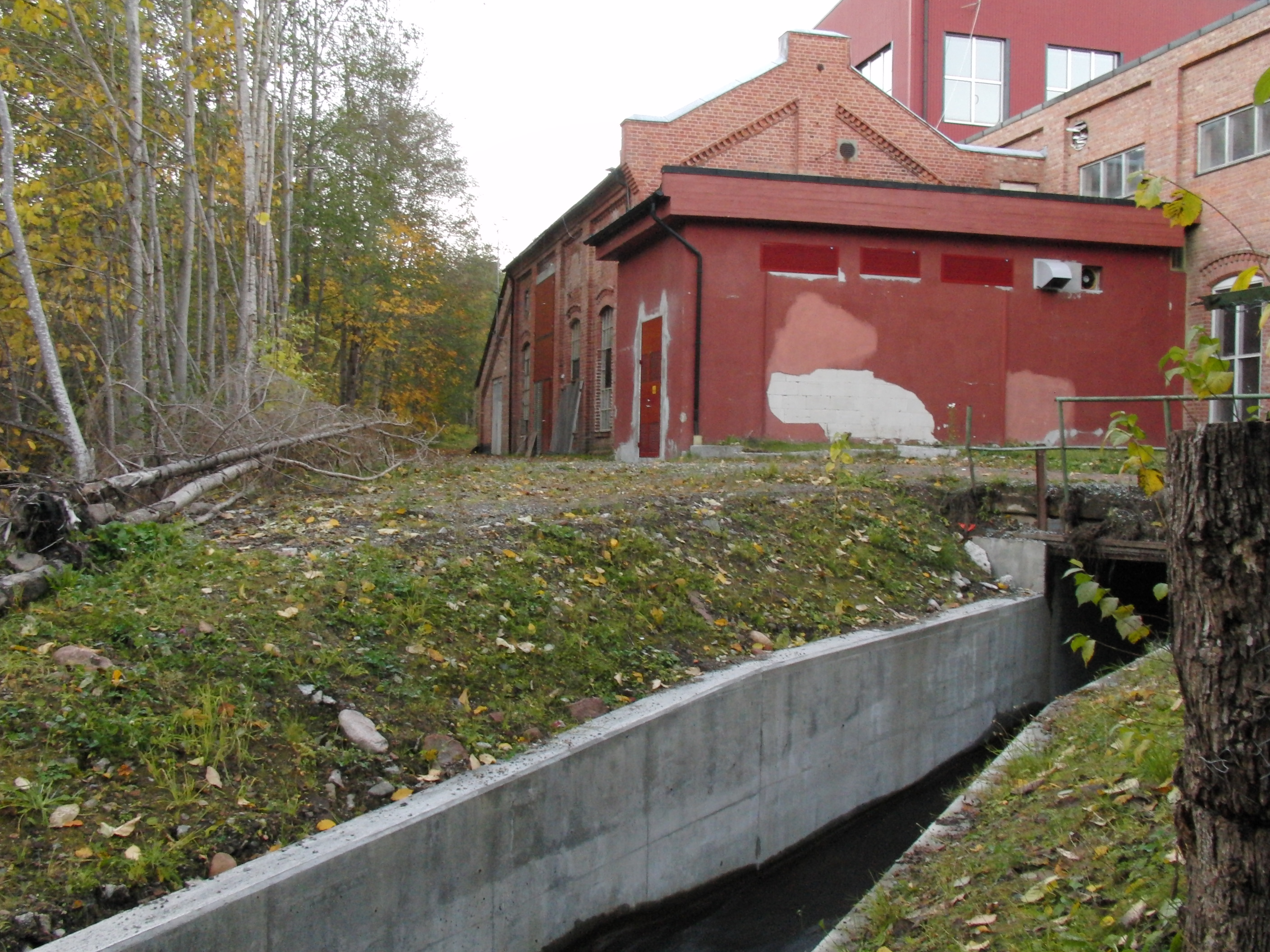 Tronstad kraftverk